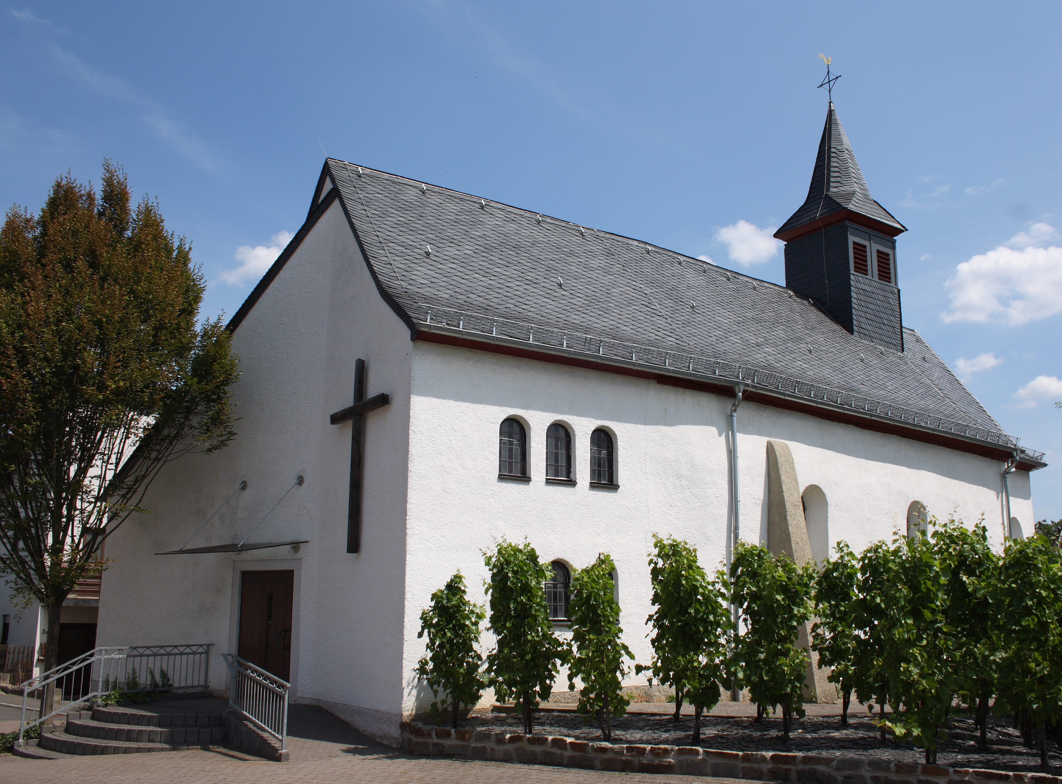 katholische Kapelle St. Wendelin in Koisdorf